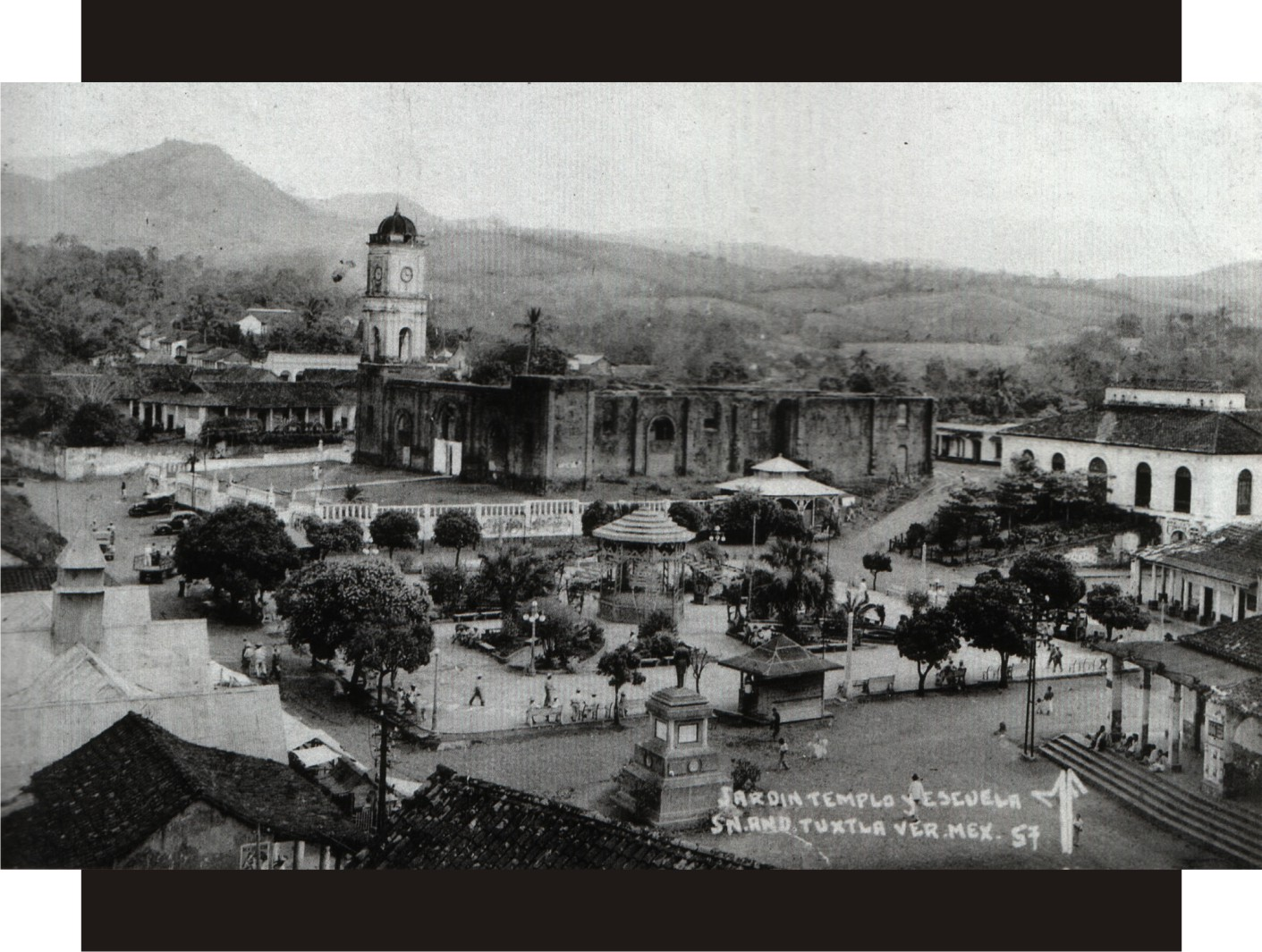 San Andres Tuxtla Catedral en construcciòn